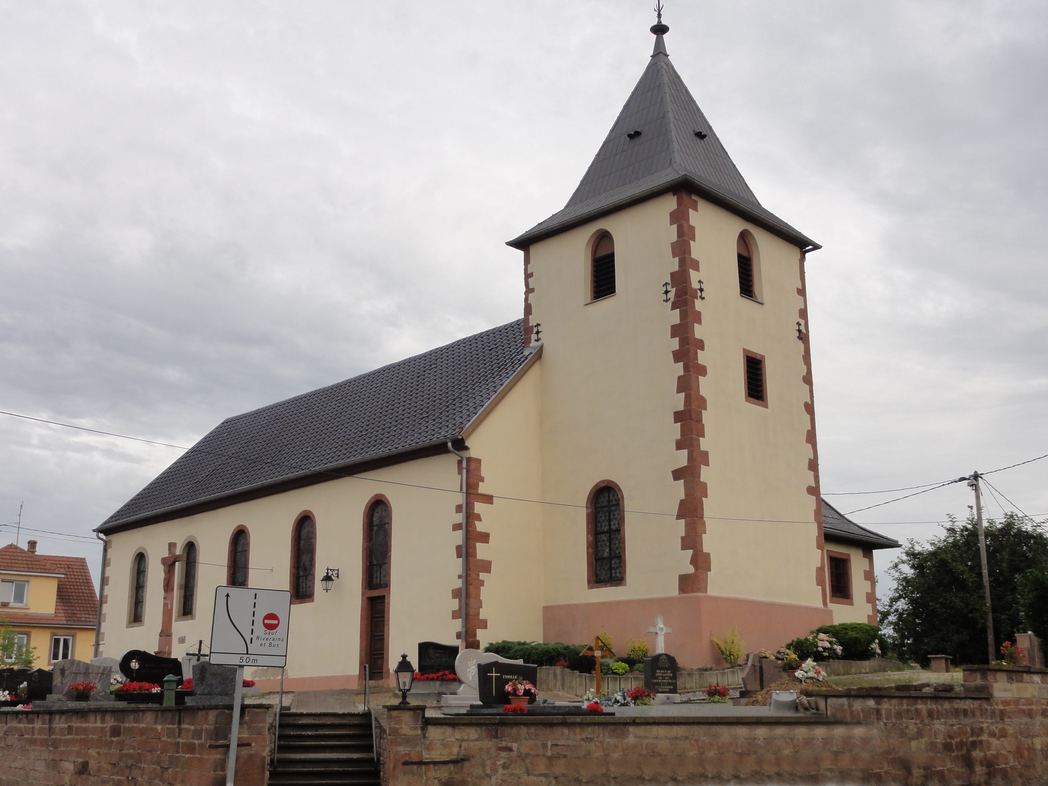 Alsace, Bas-Rhin, Église Saint-Nabor de Lixhausen (IA67009015).